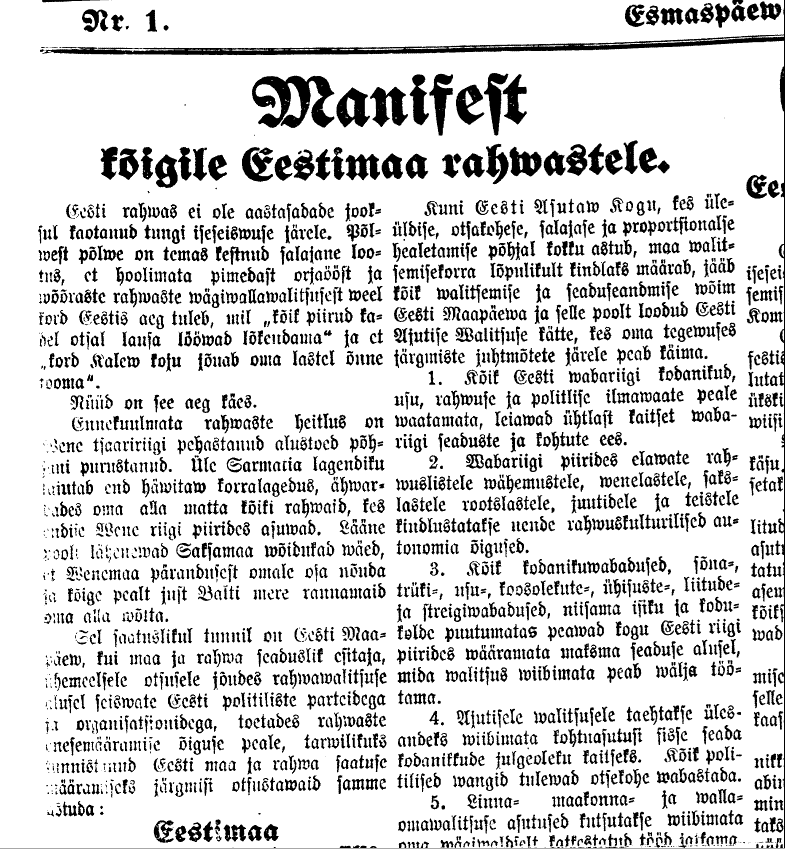 Manifest kõigile Eestimaa rahvastele avaldatuna Teatajas.